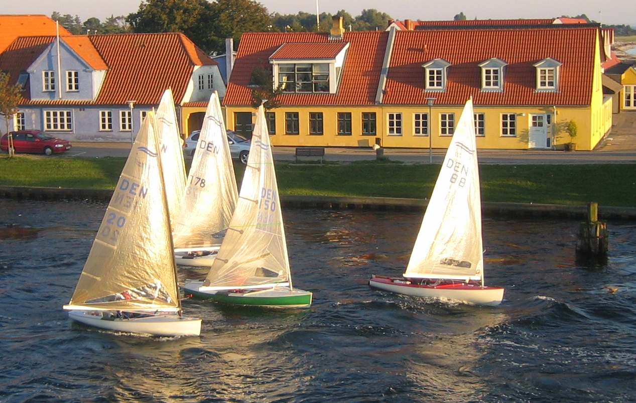 Ausschnitt aus Bild Image:IMG 1434.jpg Finn dinghies in Karrebæksminde, Denmark